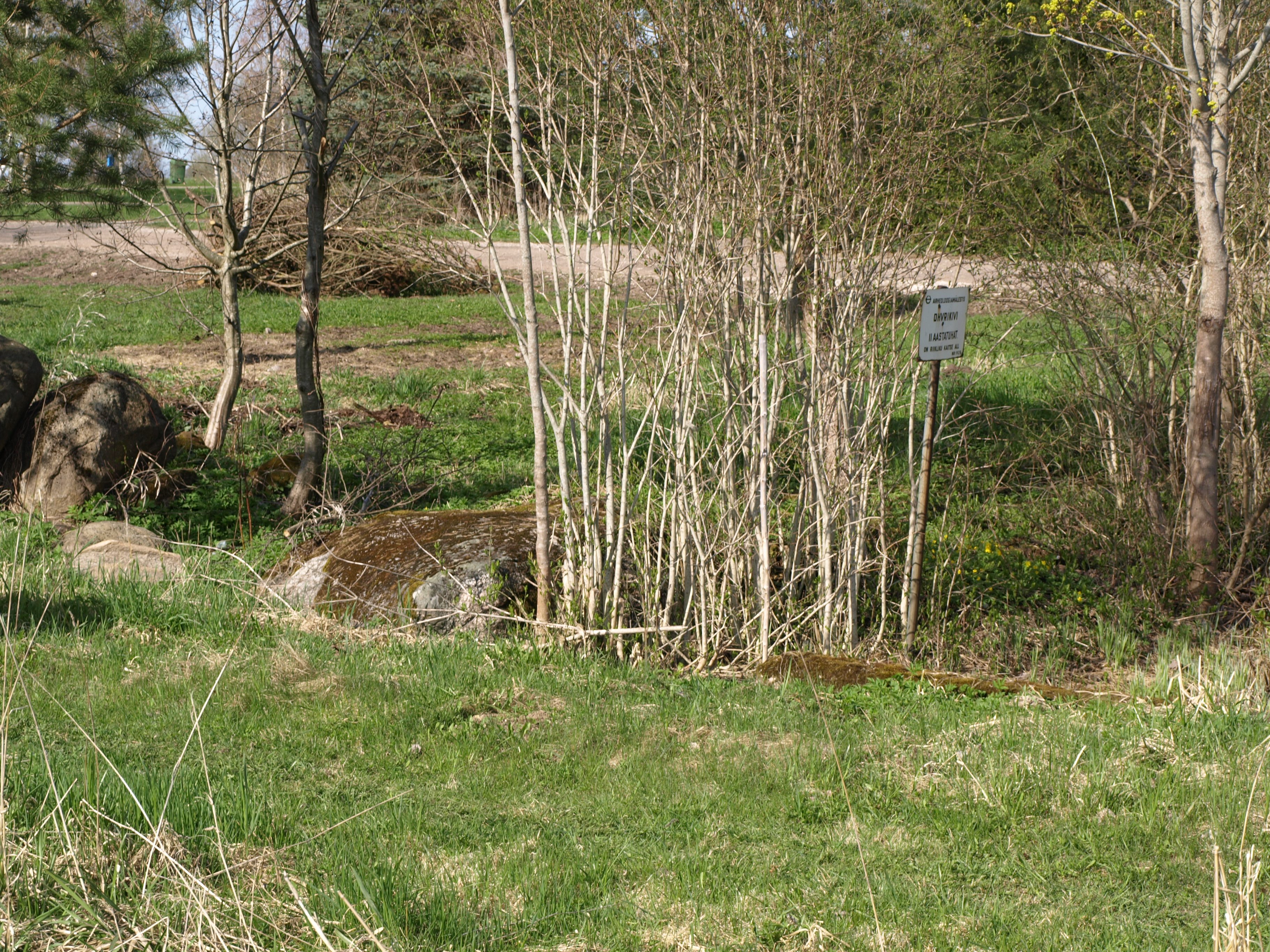 Kultuskivi